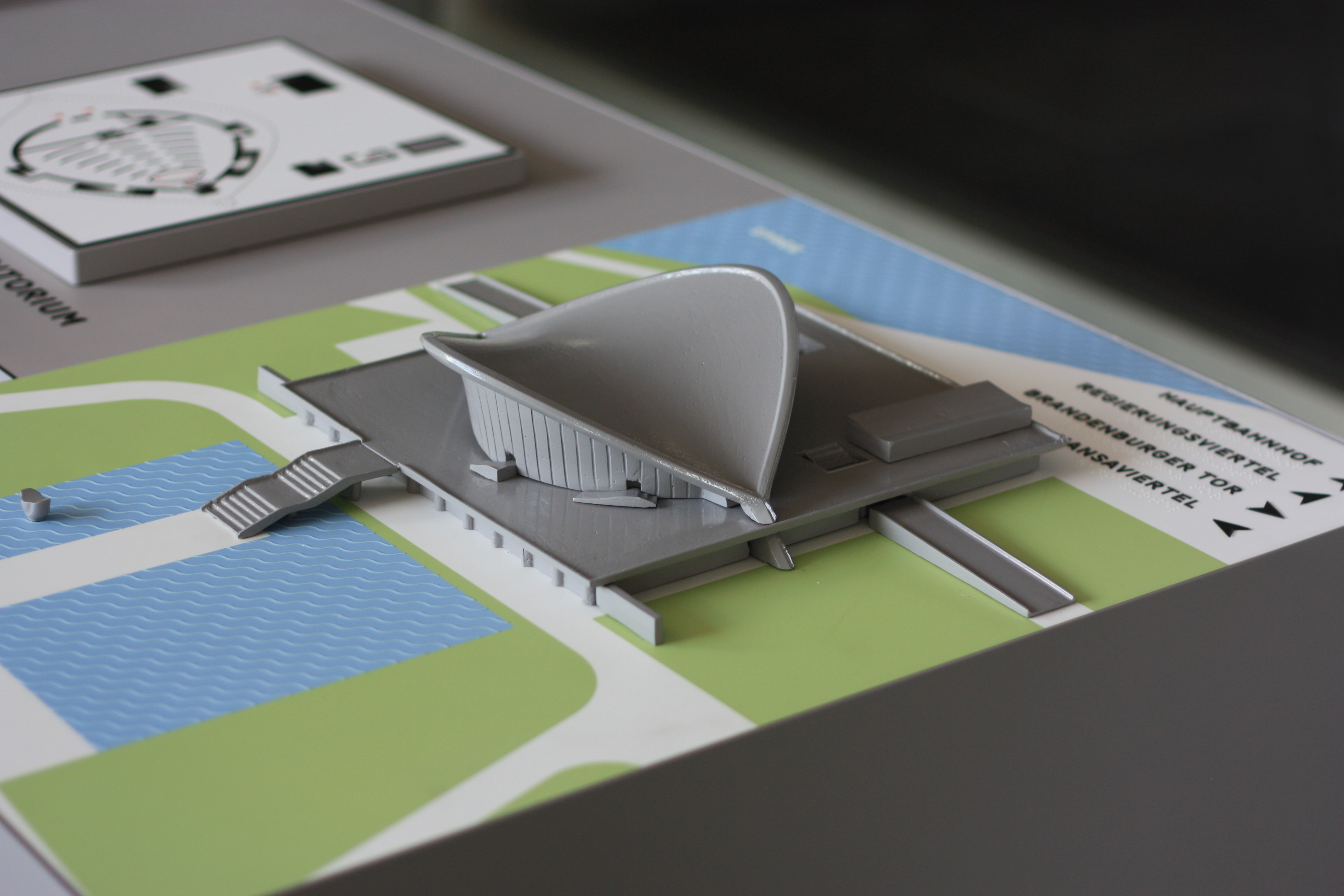 Tastmodell des Hauses der Kulturen der Welt (HKW) in Berlin mit Relief- und Blindenschrift, sowie Orientierungstafel © Tactile Studio